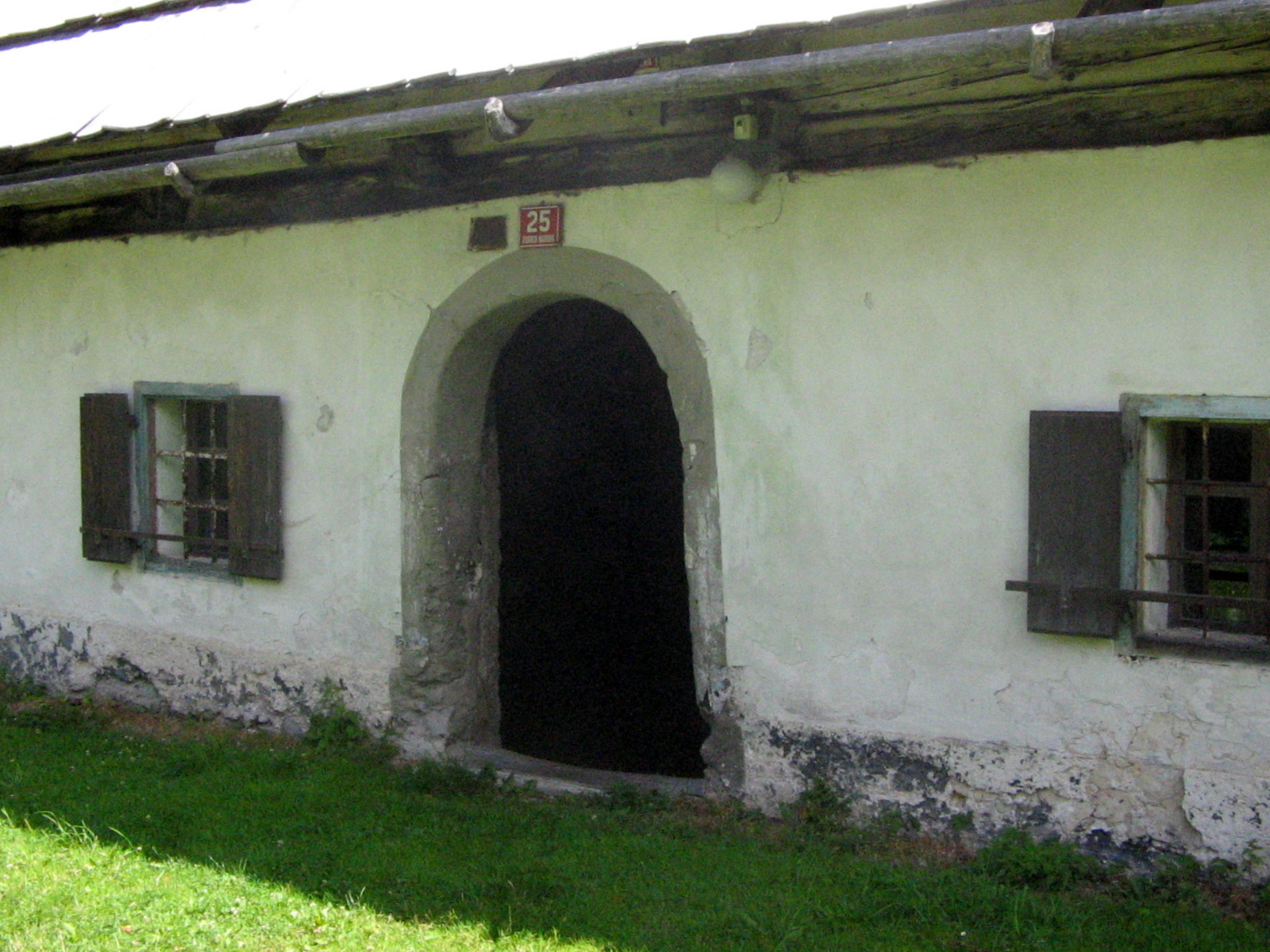 Open air museum Pocar House